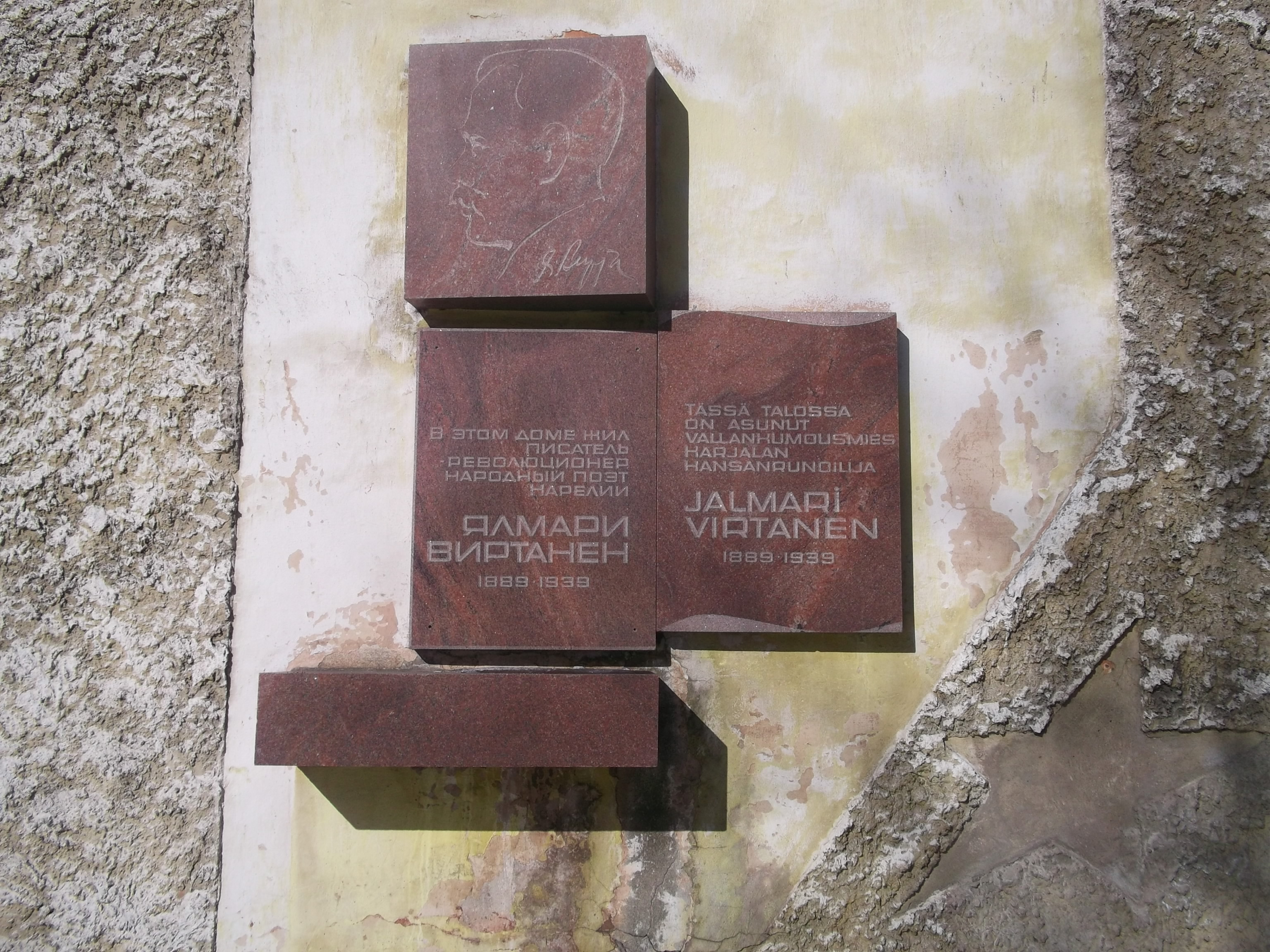 Мемориальная доска Я.Э.Виртанену в Петрозаводске на доме №18а по ул.Куйбышева